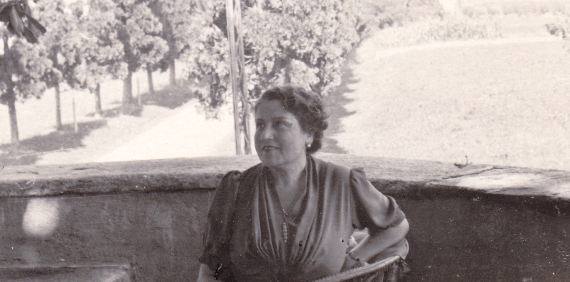 Maria Farneti - Soprano lirico nella sua casa, parecchi anni dopo il ritiro dalle scene